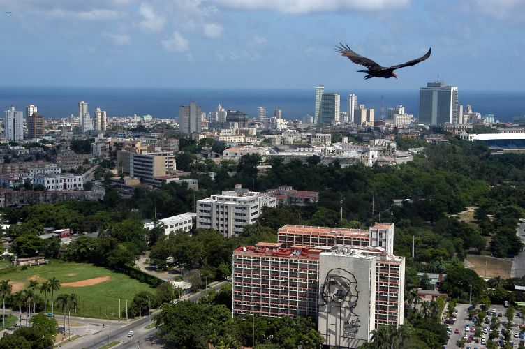 Cuba, september 2005, info in de Metadata